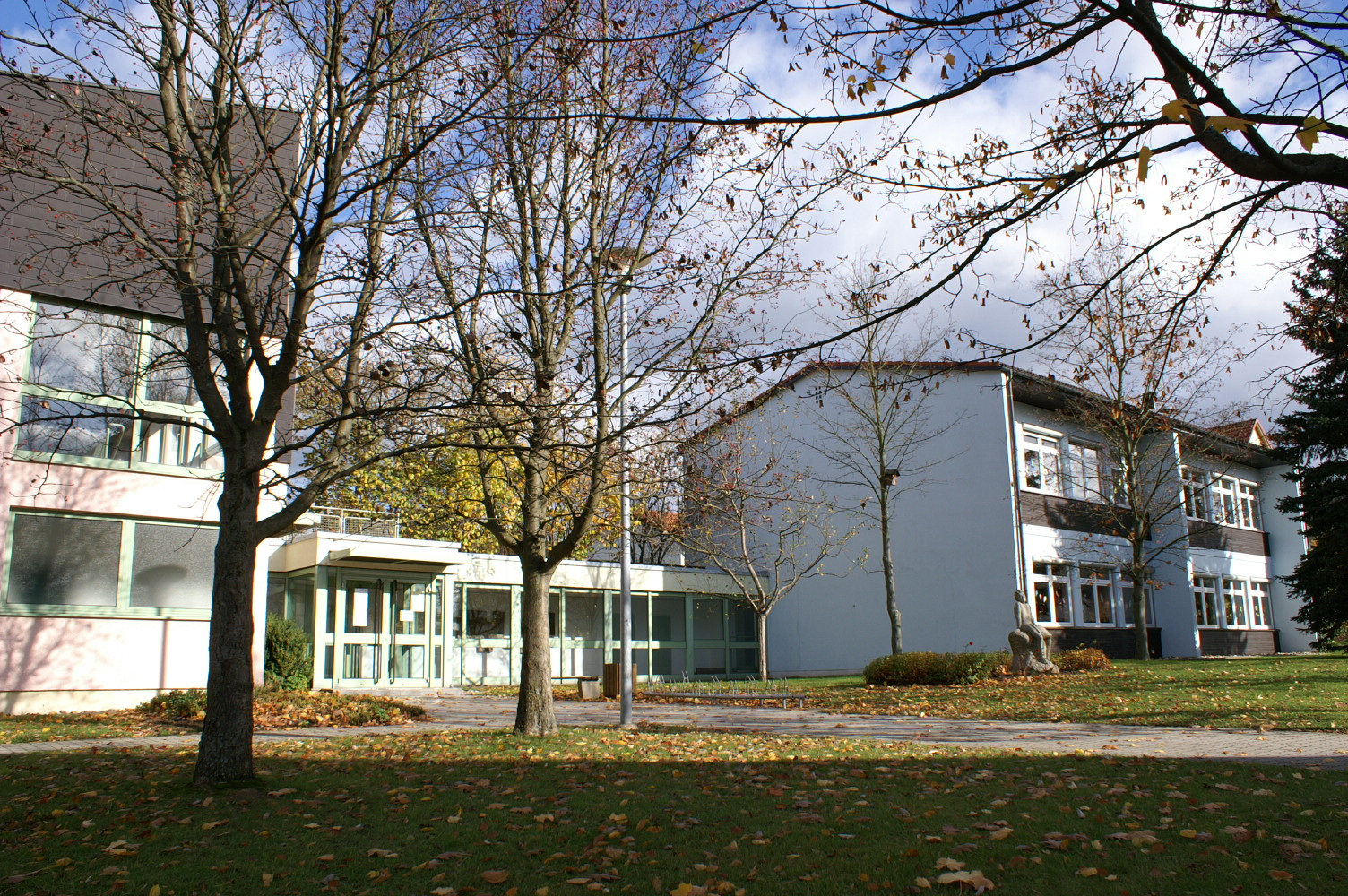 Die Grundschule in Bechtsrieth, fotografiert von Südwesten